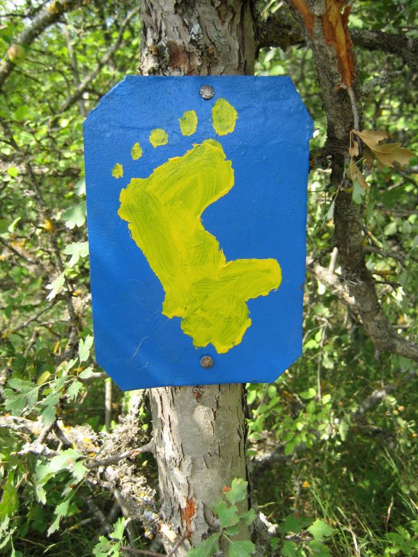 Sign marking the Janapar trail in Karabakh